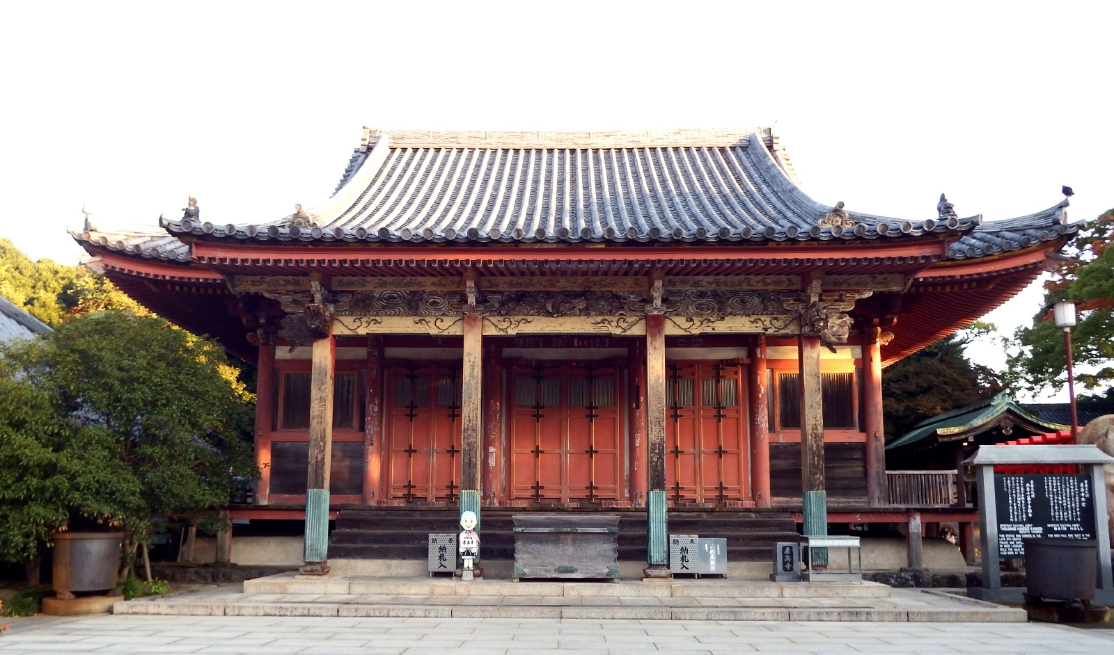 屋島寺の本堂